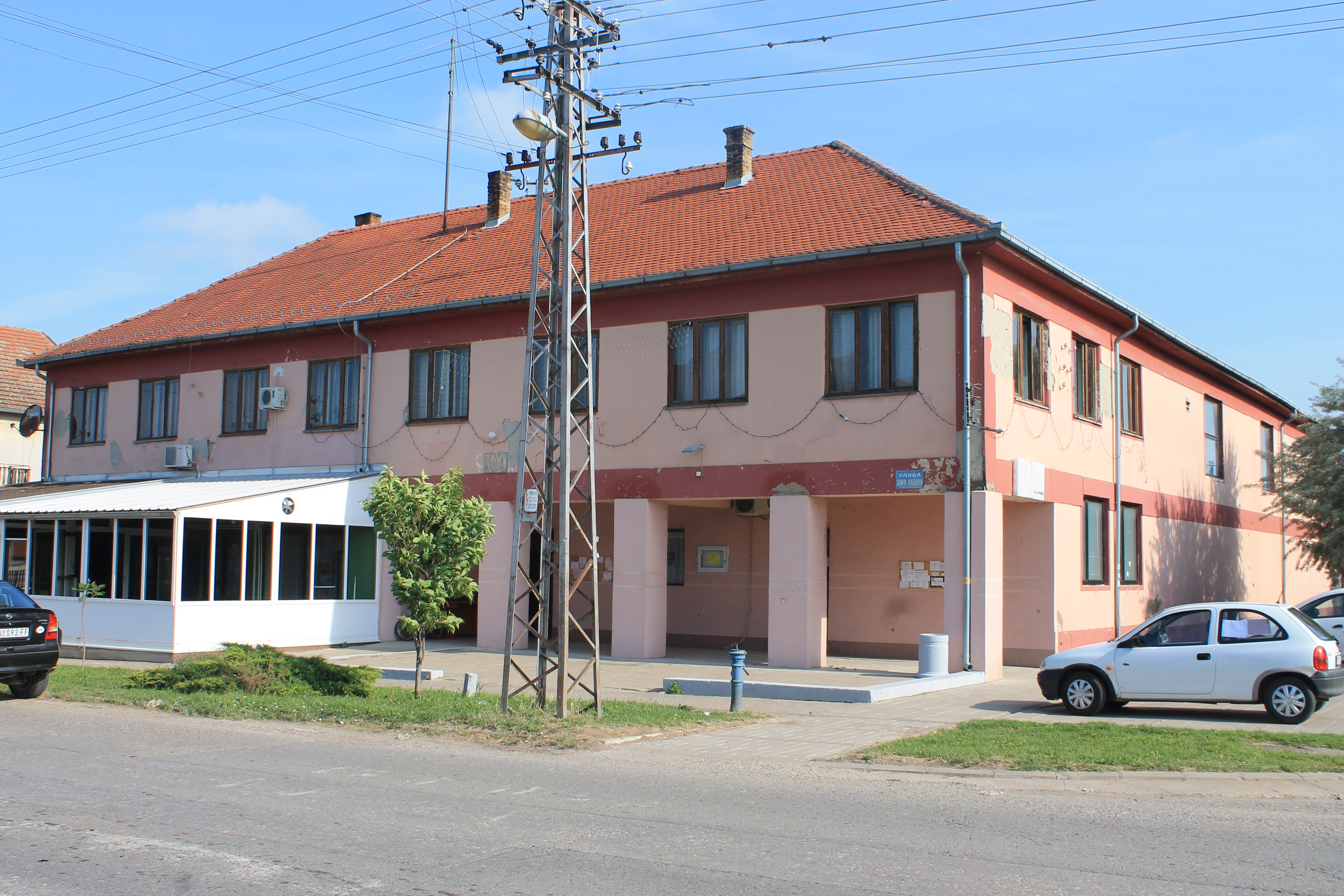 Kukujevci